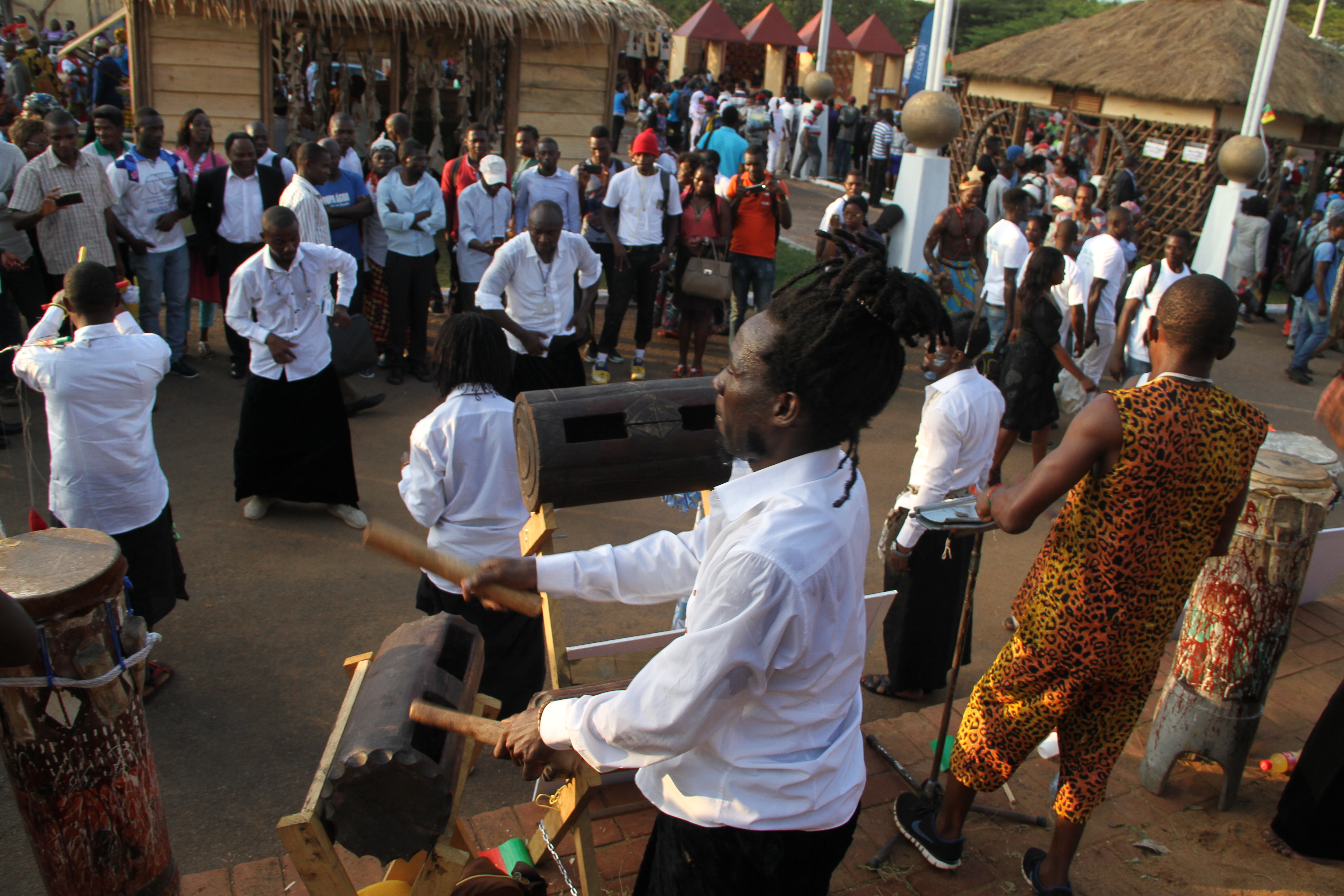 Groupe de danse traditionnel Sawa lors du Festival national des arts et de la culture (Fenac) This is an image from Cameroon